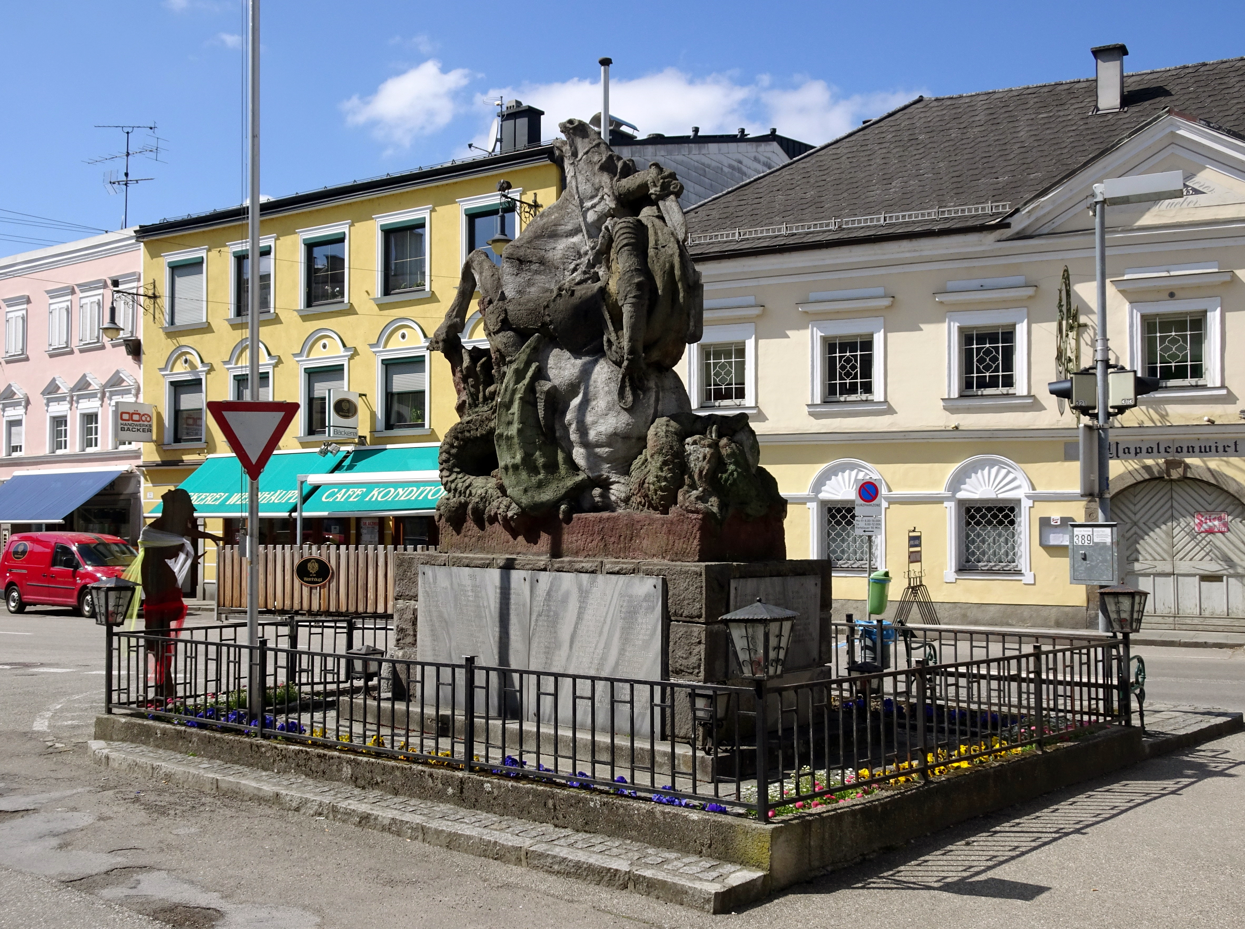 Kriegerdenkmal in Altheim